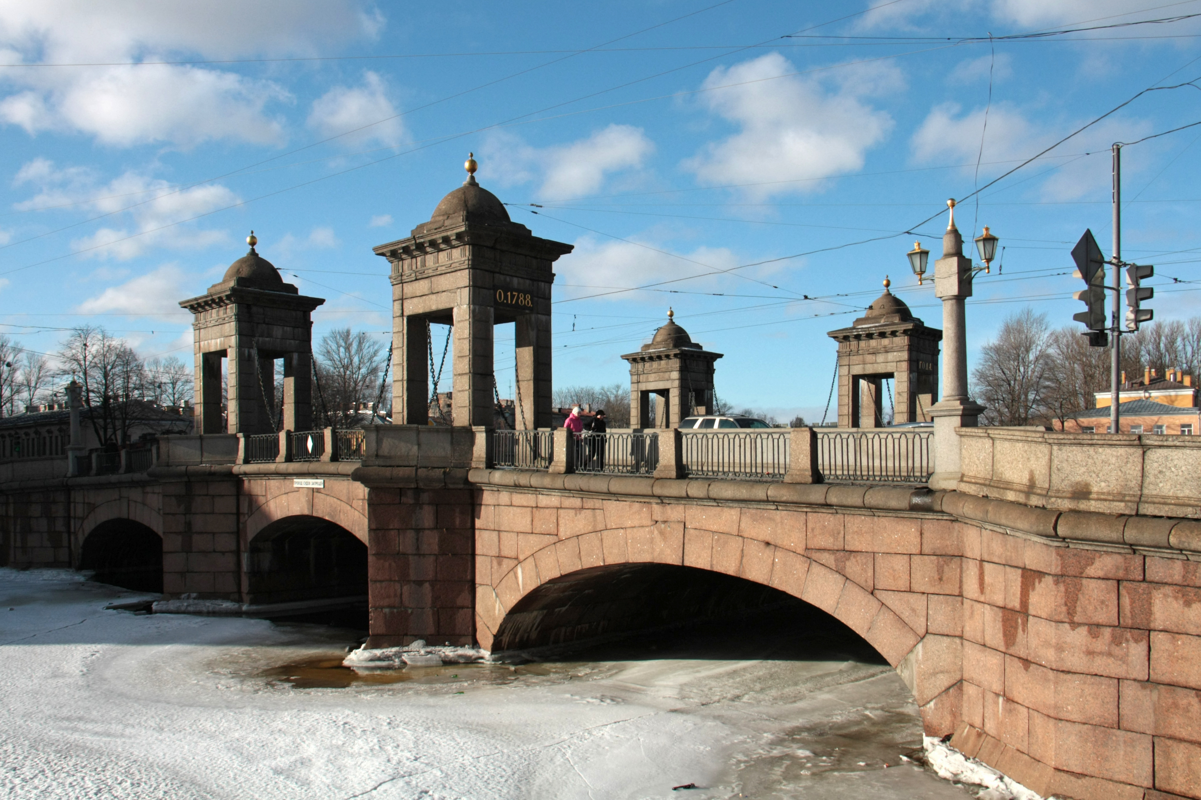 Старо-Калинкин мост: через р. Фонтанку, по Старо-Петергофскому проспекту, Адмиралтейский район, Санкт-Петербург